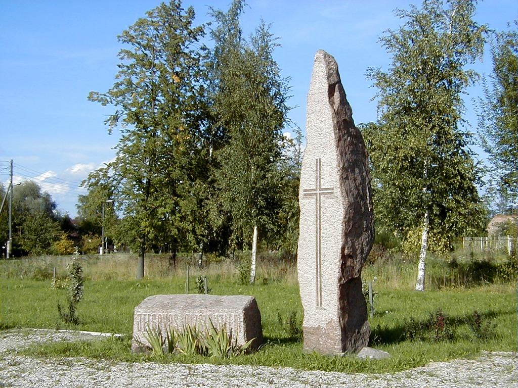 Jelgava, piemineklis 1944. g. kaujām. 2000-09-02